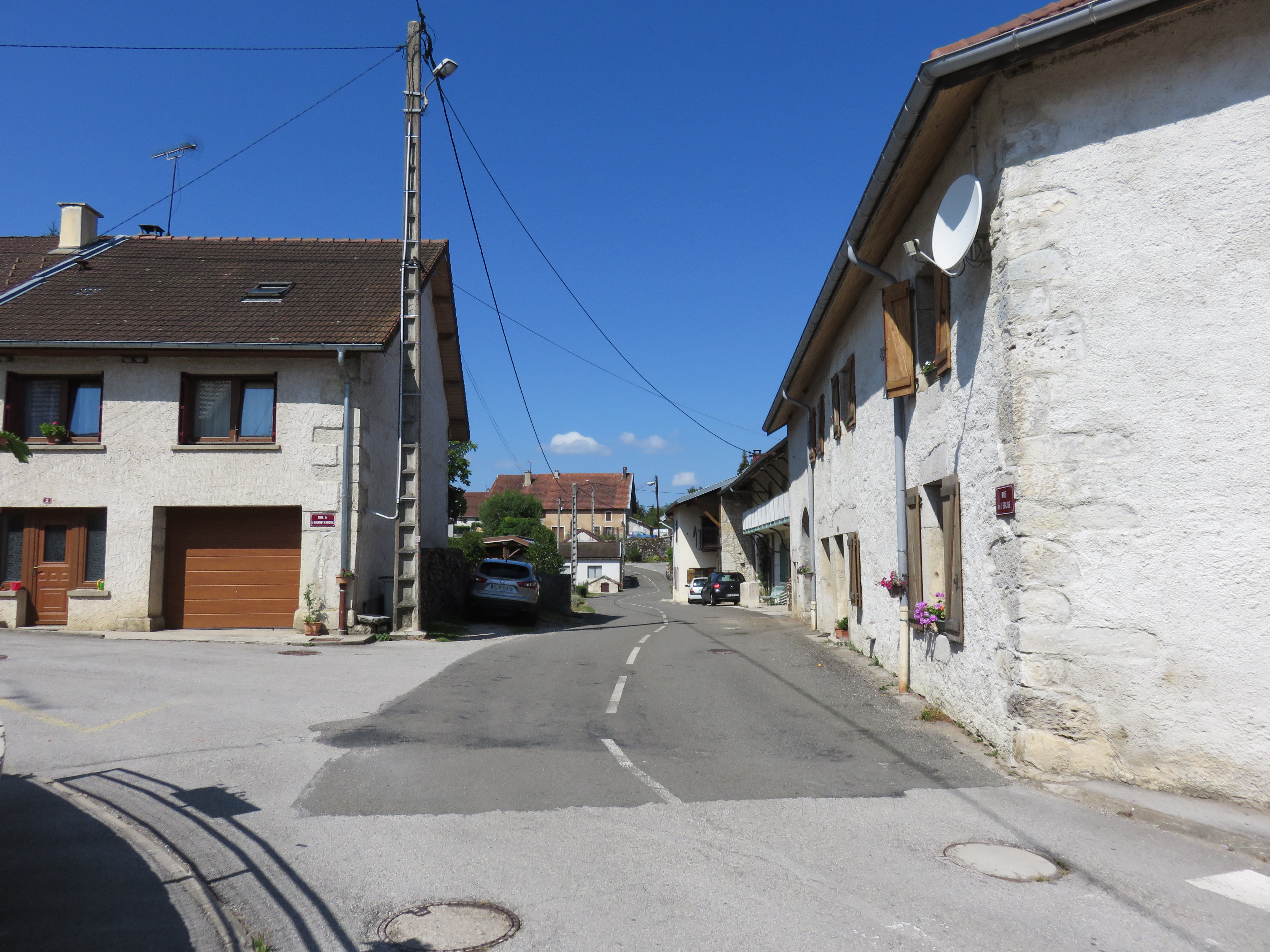 Rue de l'Église à Charchilla (Jura, France).